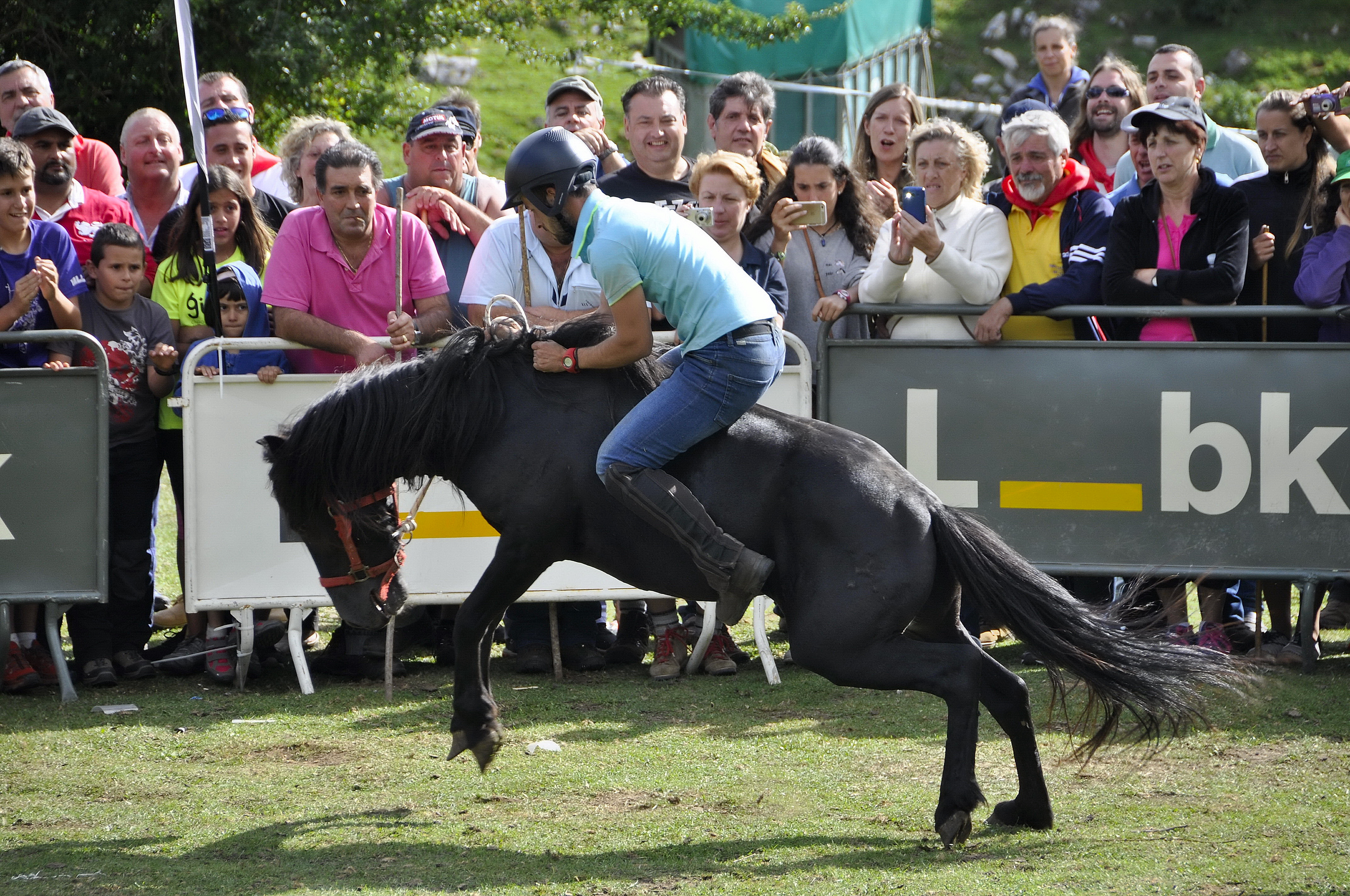 Fiesta del Asturcón-XXXVI edición. Intentos de doma y monta del asturcón This is a photography of a Folklore festival in Spain (Wikidata id Q5861751).